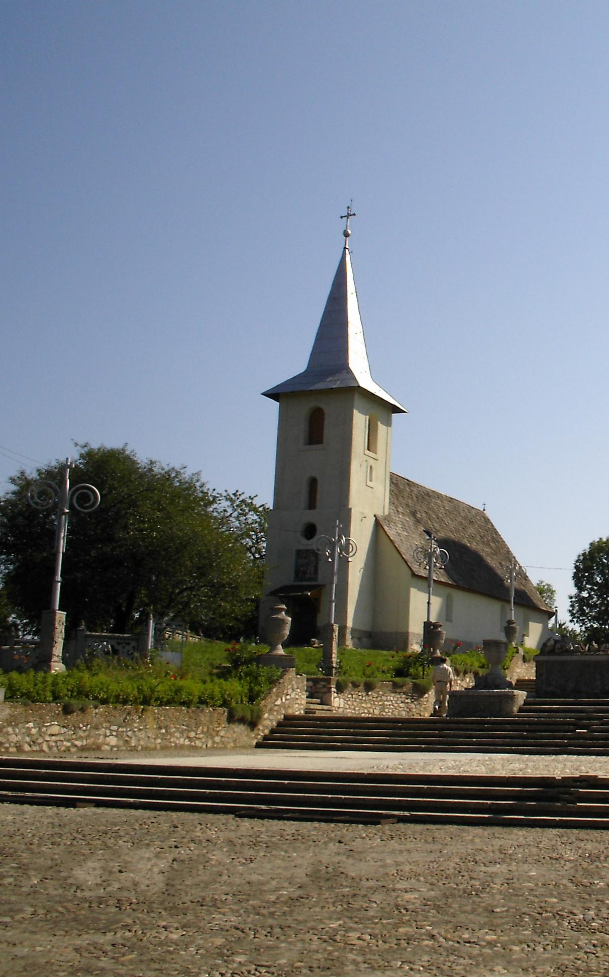 Biserica veche "Sf. Arhangheli"